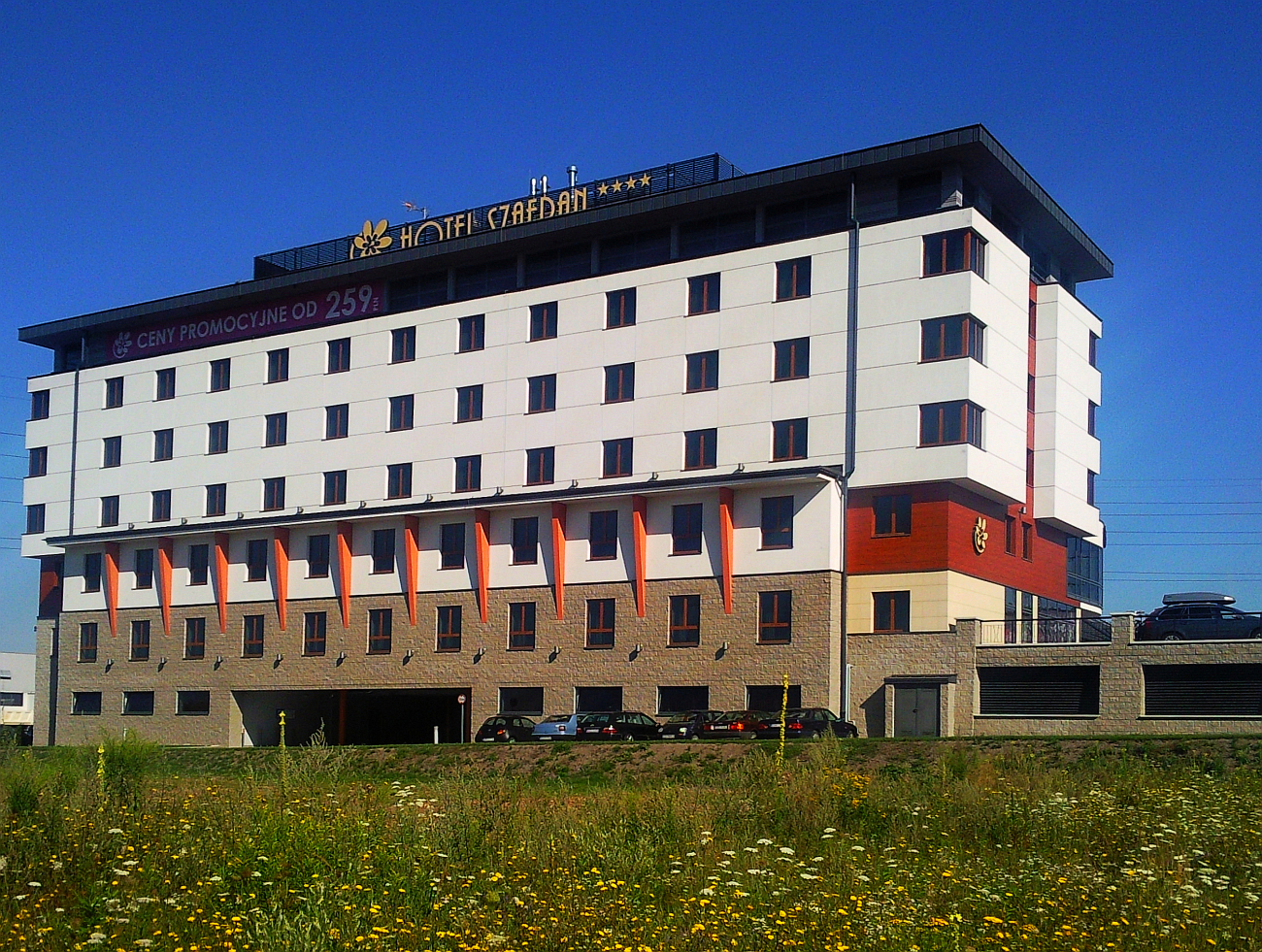 HOTEL SZAFRAN to czterogwiazdkowy obiekt biznesowo – konferencyjny, położony niedaleko Centrum Handlowego M1